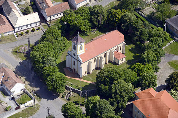 Szent István Király templom, Légi fotó, Heves m., Apc